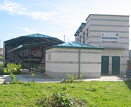 Fotografía Bolera Municipal de Noreña.